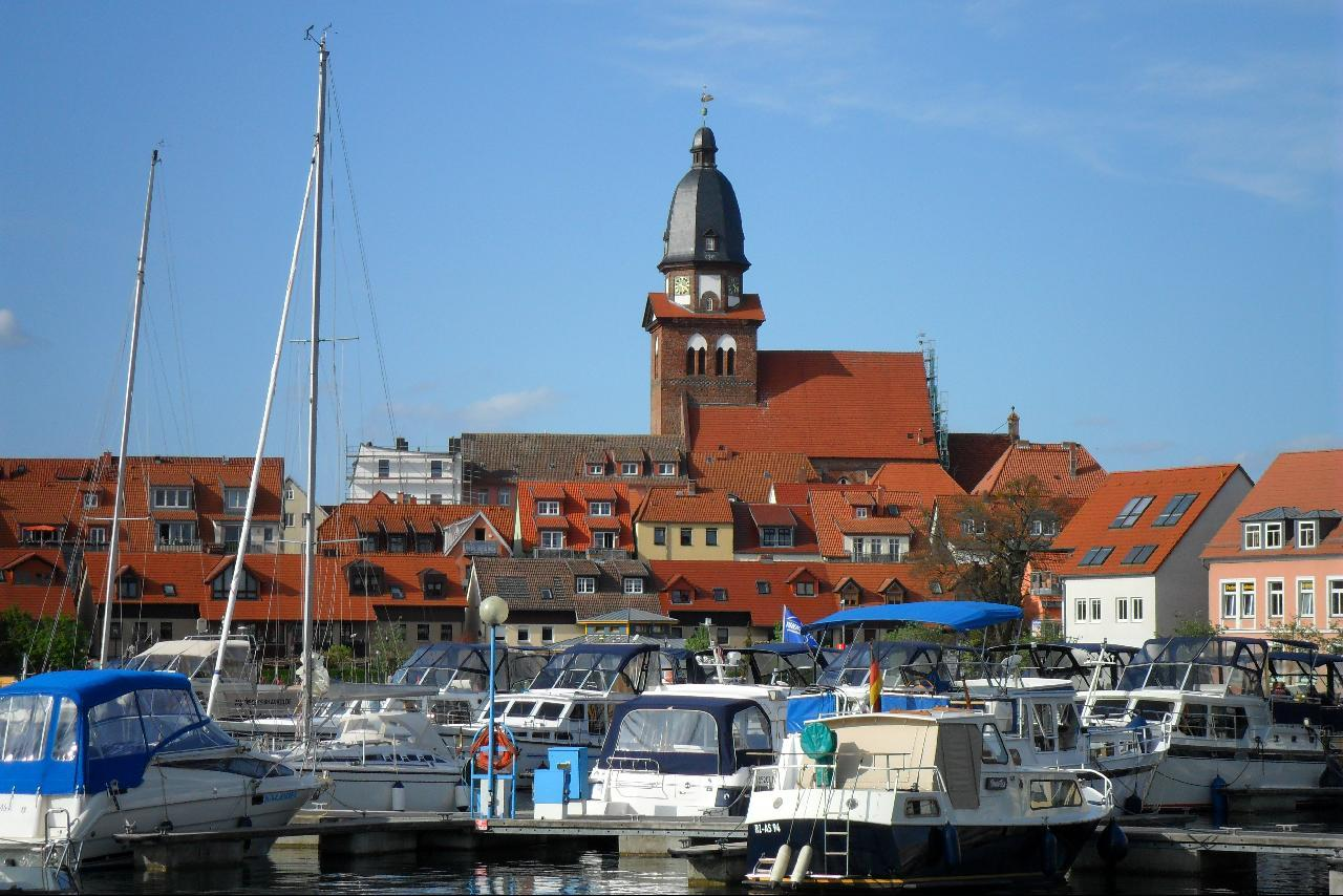 Hafen Waren (Müritz)